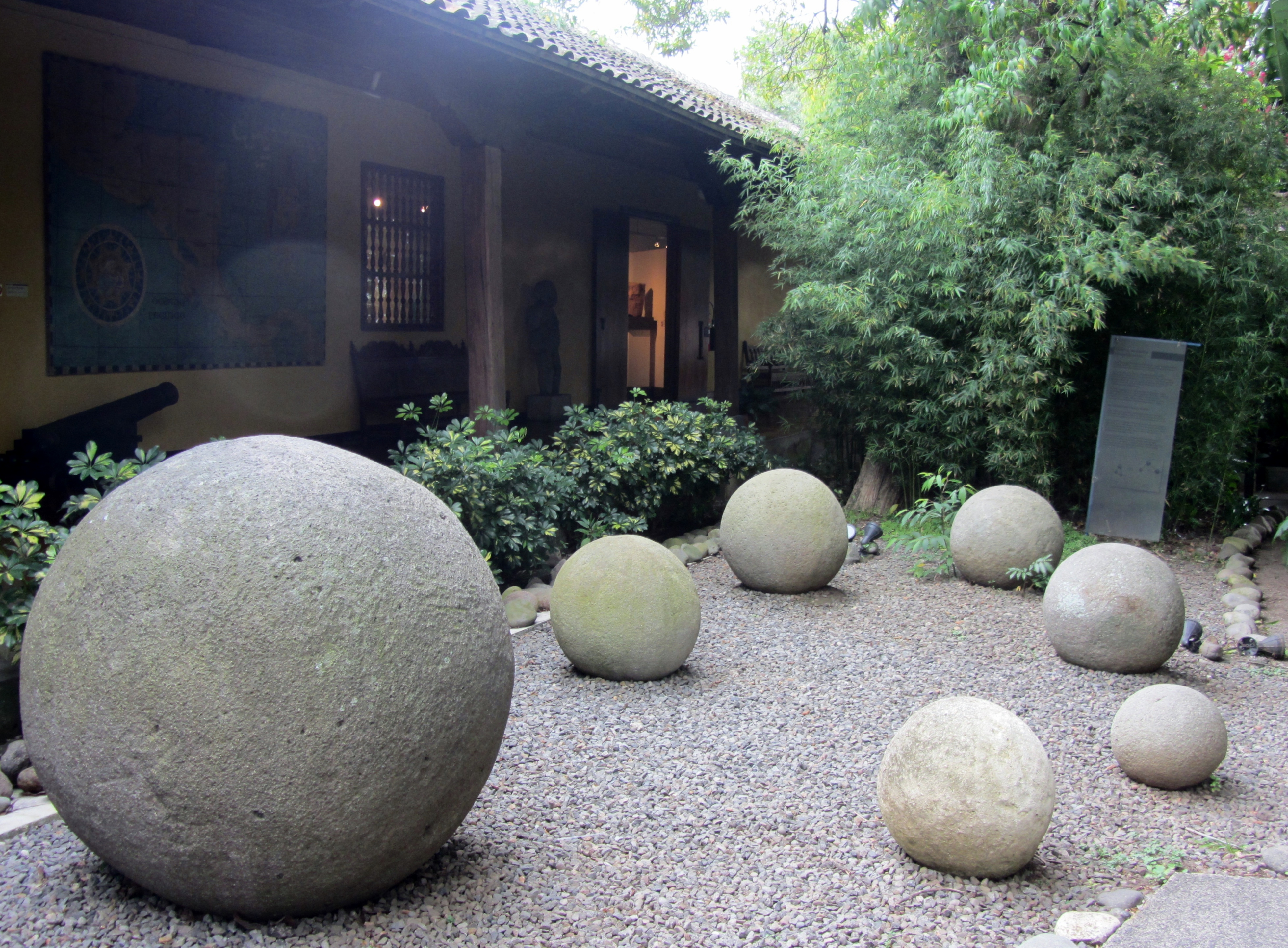 Jardín con alineacion de esferas. Museo Nacional de Costa Rica